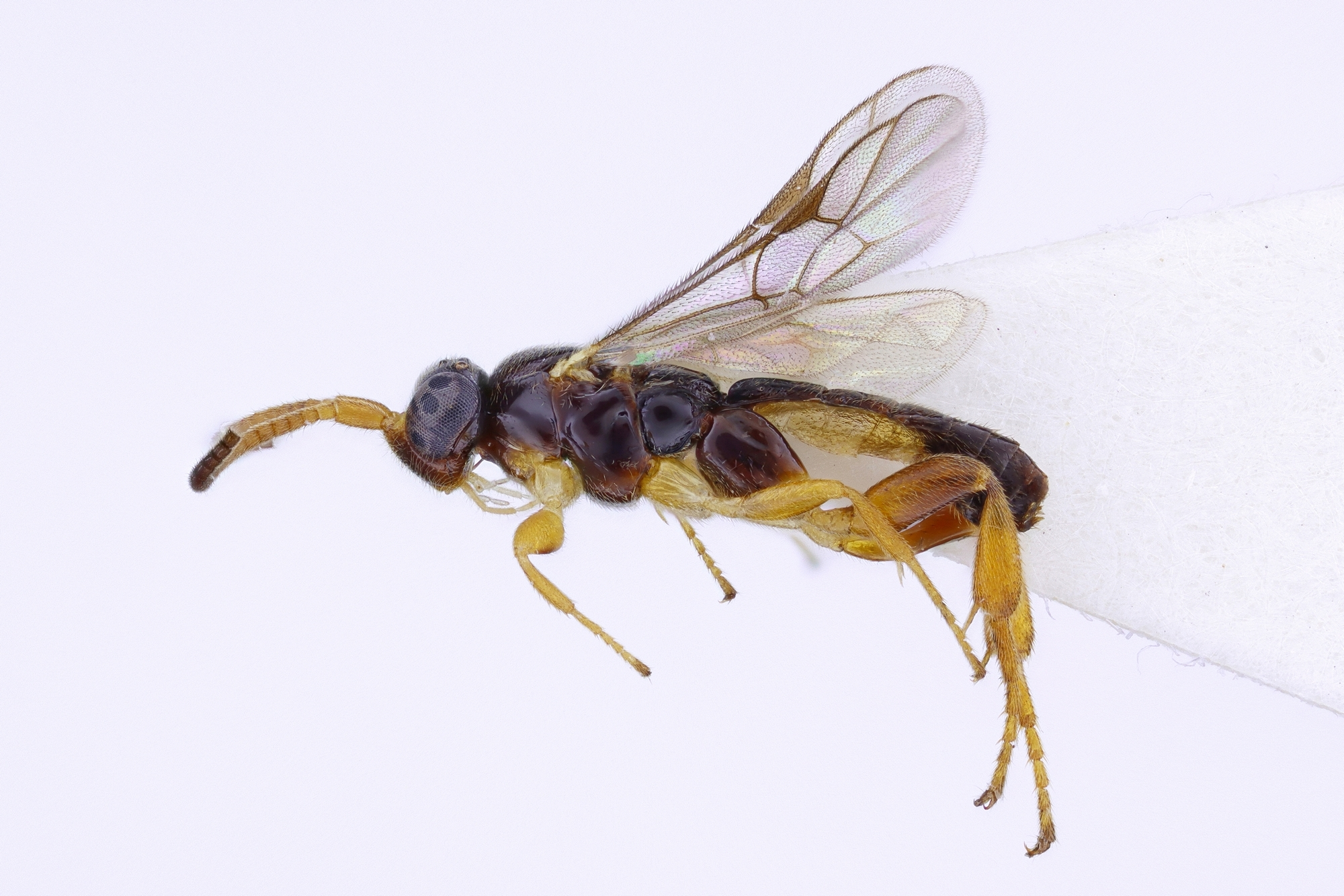 Schlupfwespe der Art Orthocentrus ashaninka Zwakhals, 2015 (Orthocentrinae) aus Peru (Dept. Huánuco, Panguana). Publikation: Mitt. Münchner Ennt. Ges. 105, 65-78, 2015.